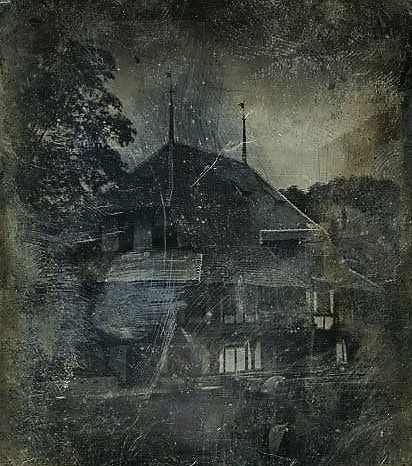 Burgerbibliothek Bern, F.Dag.106